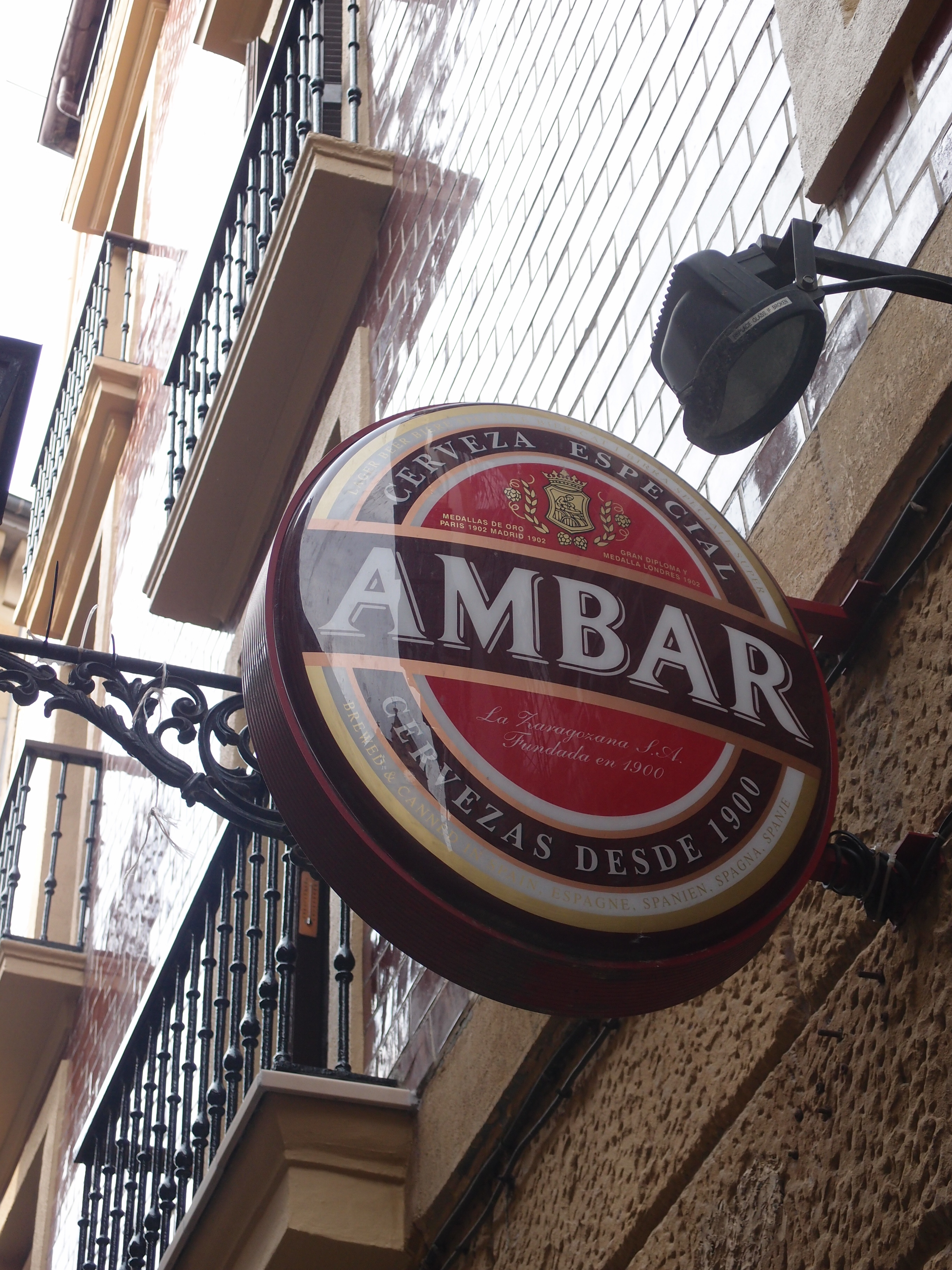 Ambar-Leuchtwerbung in Donostia-San Sebastian Datum: 10.05.2014 Urheber: M. Pfeiffer alias Gordito1869 Quelle: privates Fotoarchiv des Urhebers